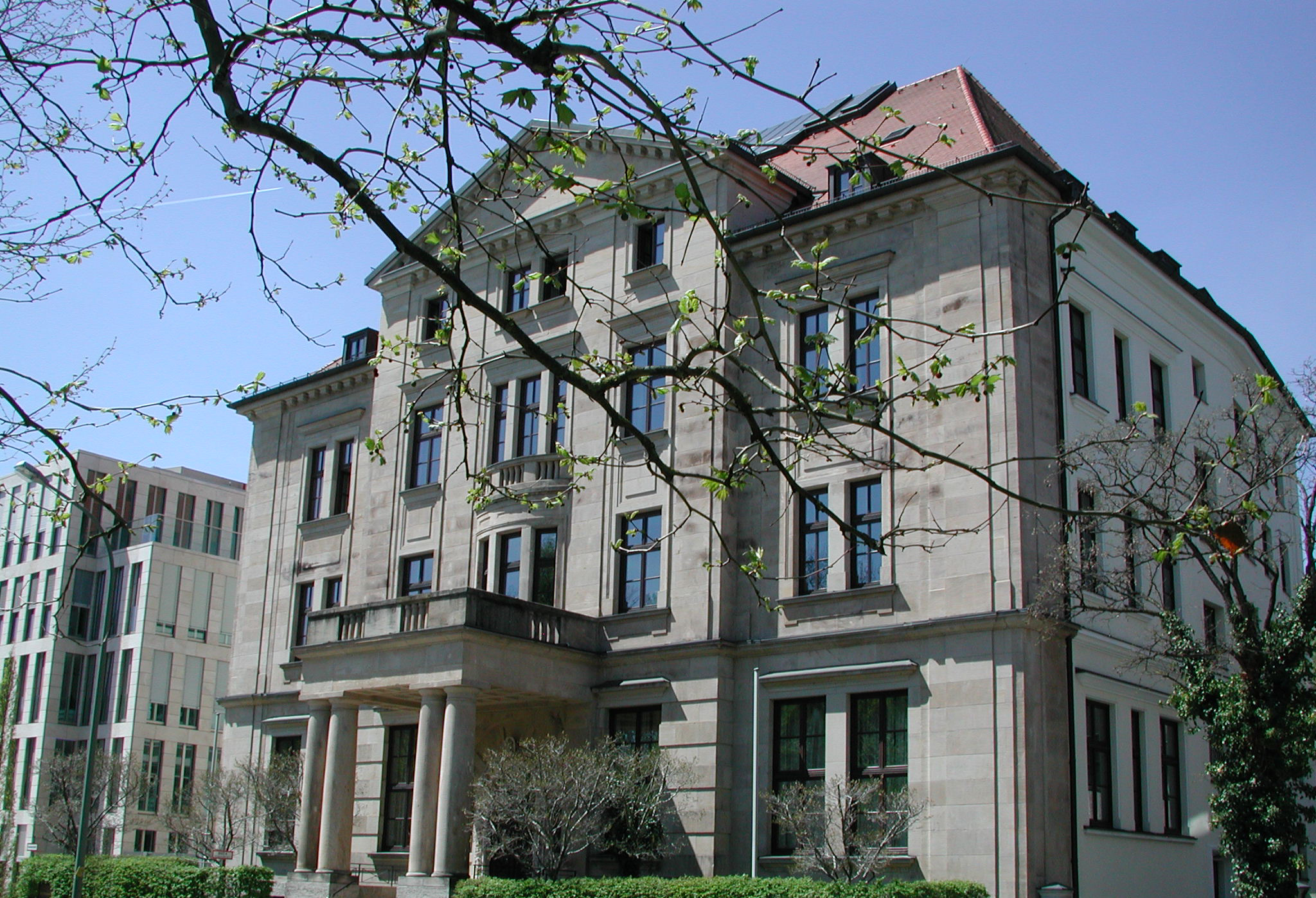 LfA Königinstraße 17